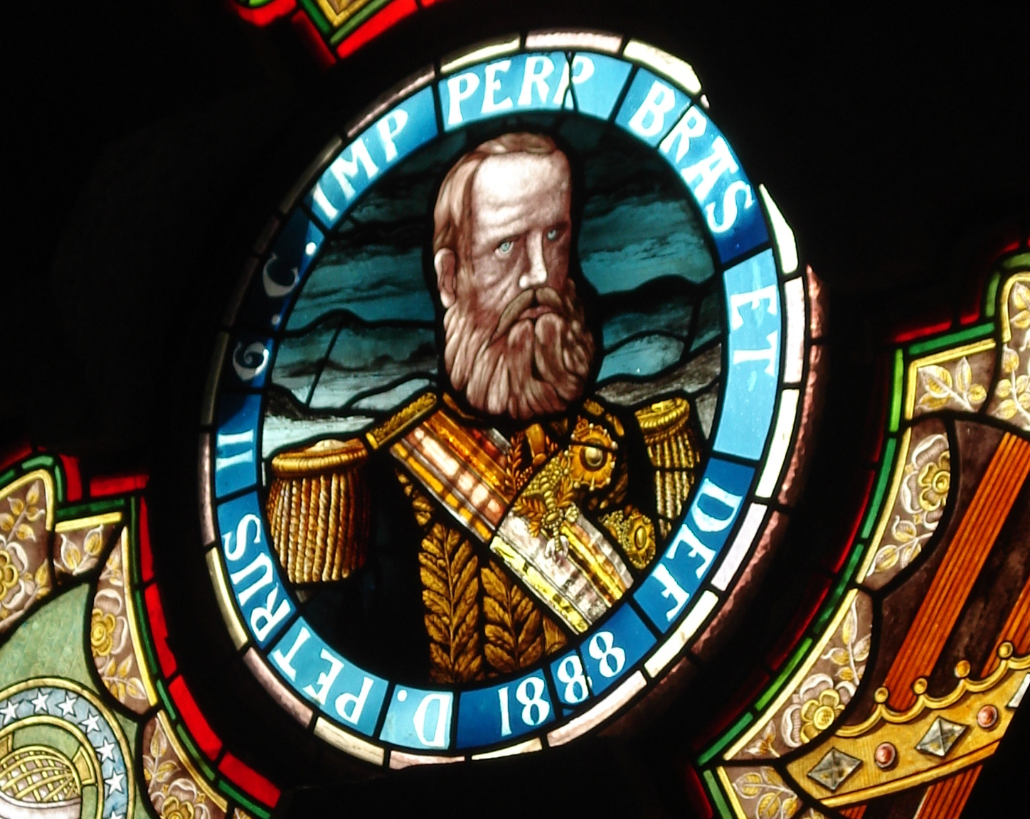 D. Pedro II em representação na Ilha Fiscal, onde foi realizado o último baile imperial.